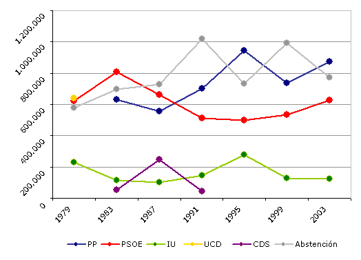 Distribución de los votos por partido en la ciudad de Madrid desde 1979. Fuente [1] [2] en Ayuntamiento de Madrid.